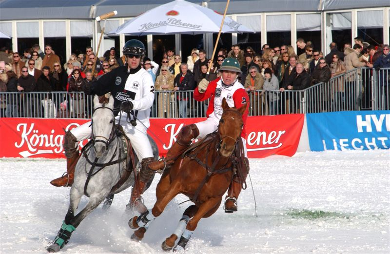 Eva Bruehl beim Snow-Polo Worldcup 2009 in Kitzbuehel